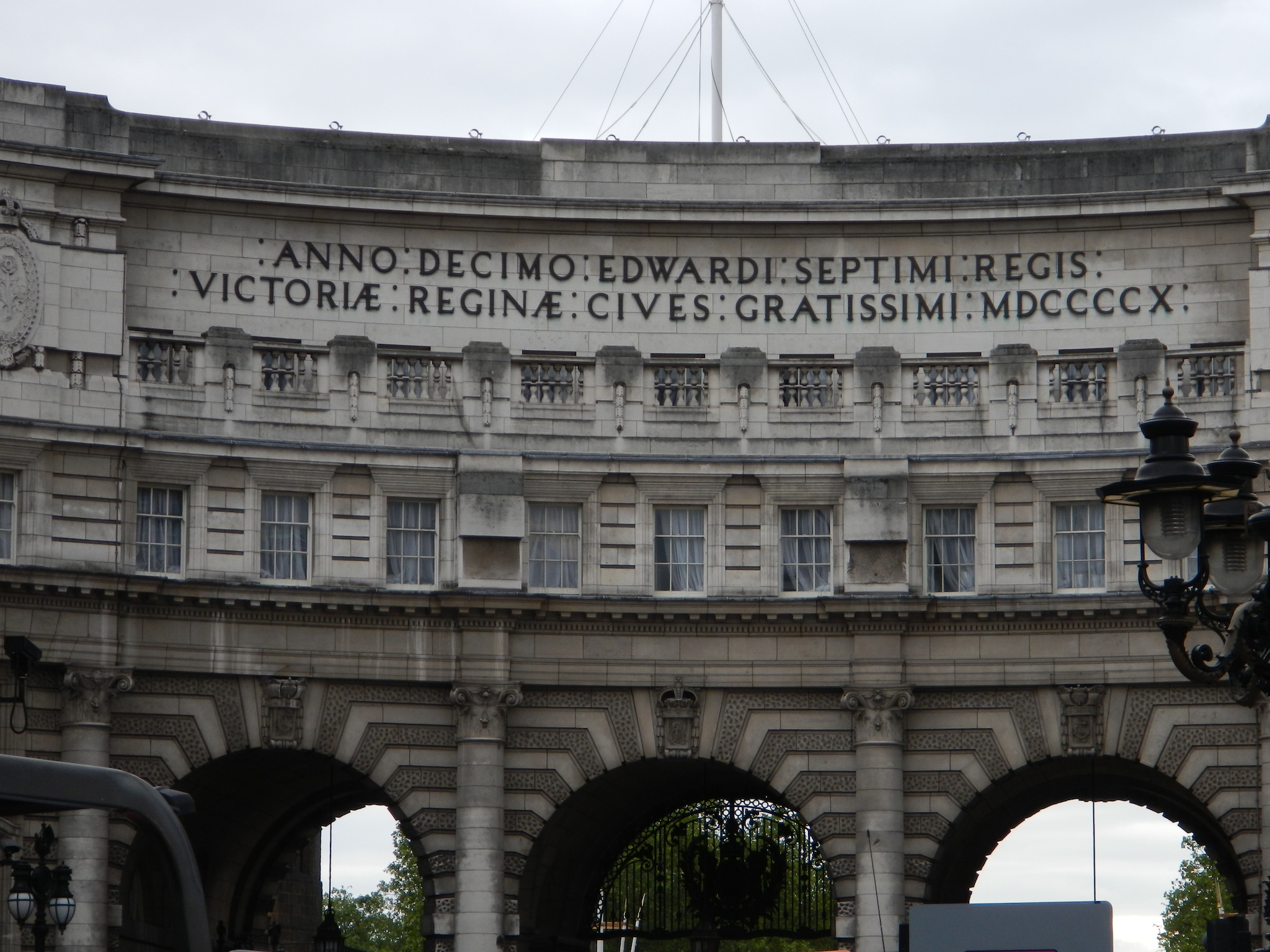 London, UK